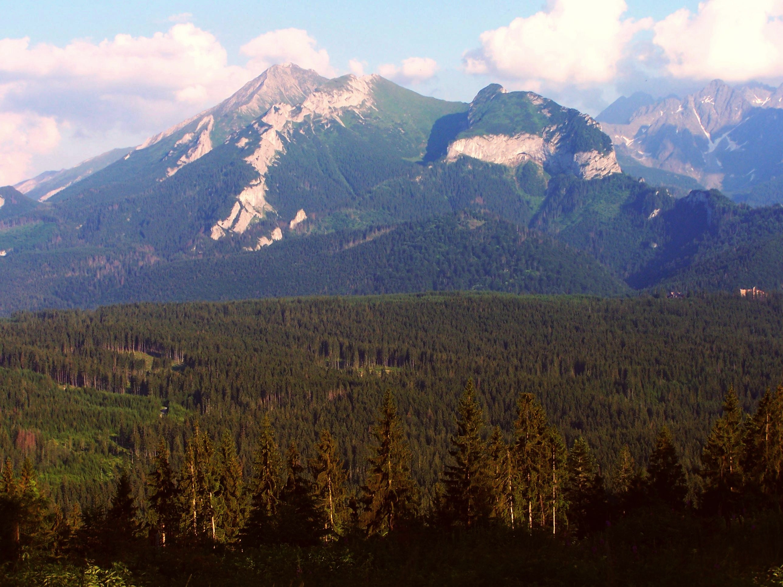 Widok z Bukowiny Tatrzańskiej. U góry Hawrań. Nowy wierch i Murań. Na dole Kiczera i Dolina Międzyścienna